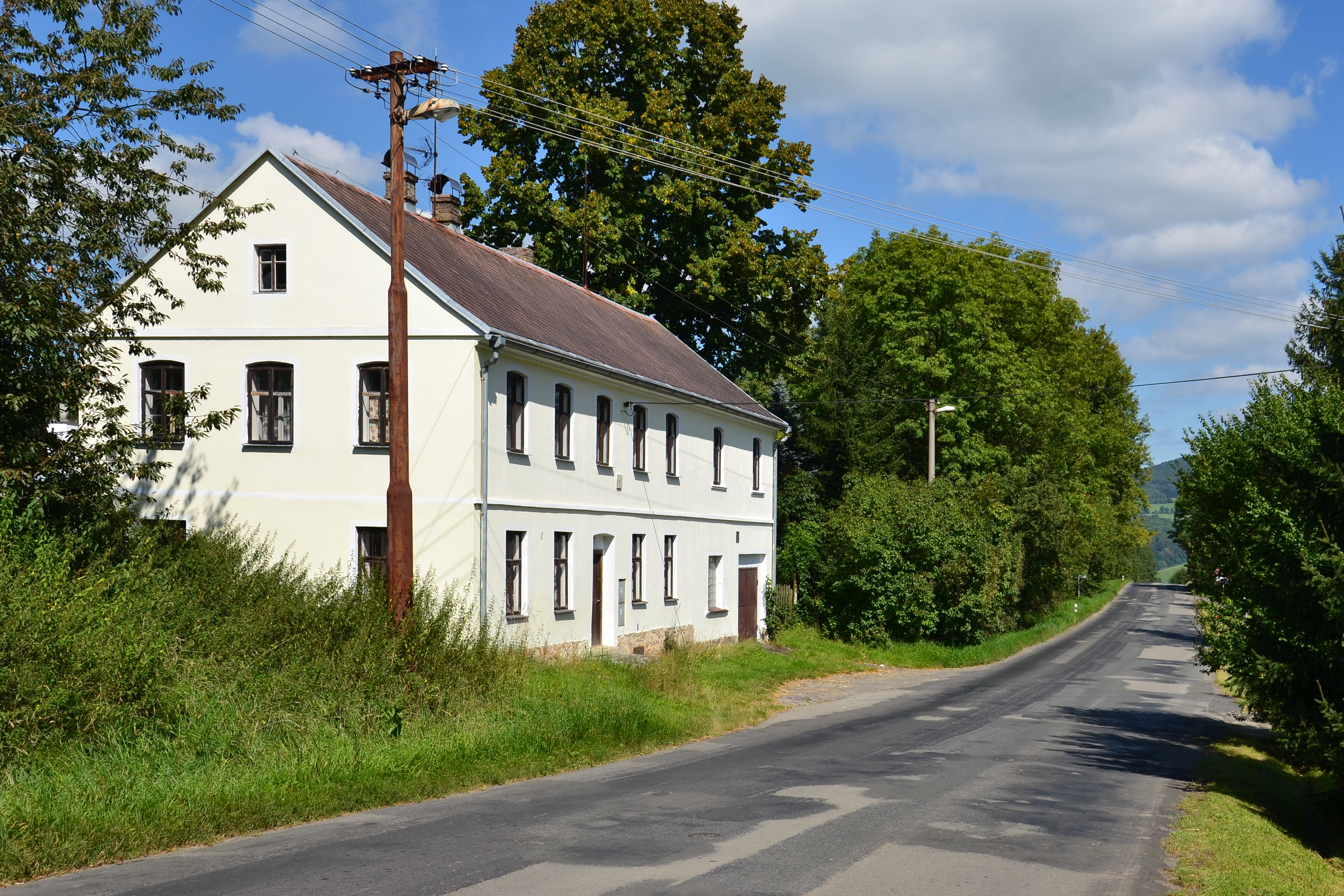 Dům čp. 101